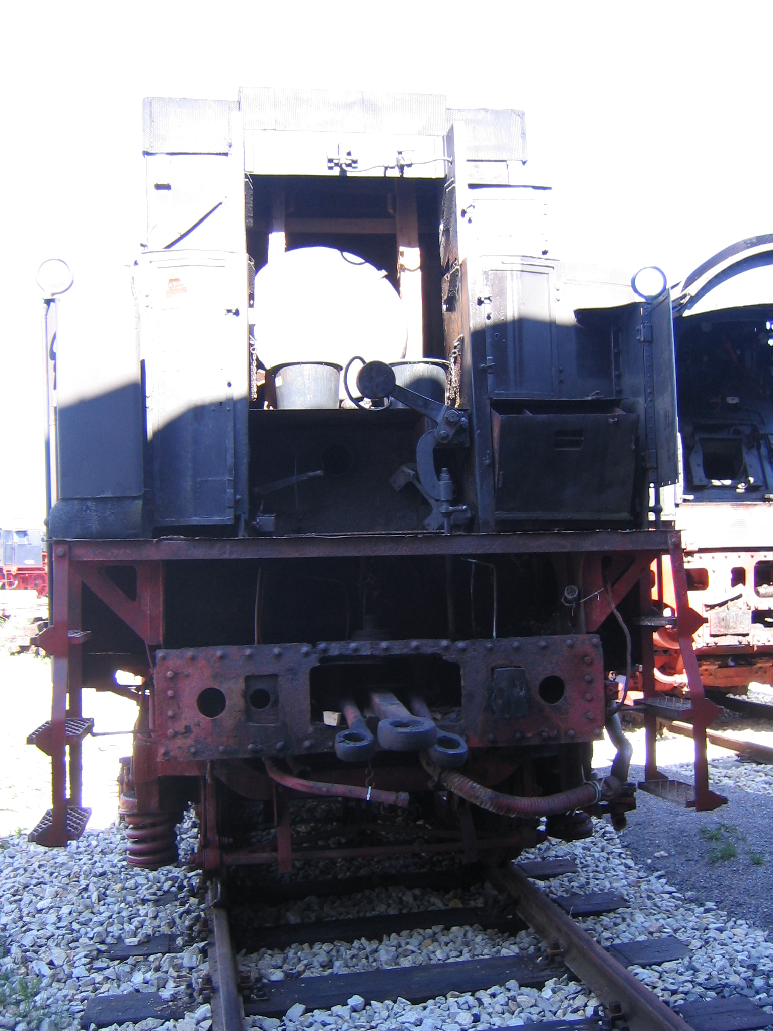 Vorderseite eines Einheitsenders im Bayerischen Eisenbahnmuseum Nördlingen in der Mitte der Hebel mit Gewicht ist die Handbremse, unten sind die Kupplungen und Schliggerdämpfer zu sehen, mit denen der Tender an die Lok gekuppelt wird